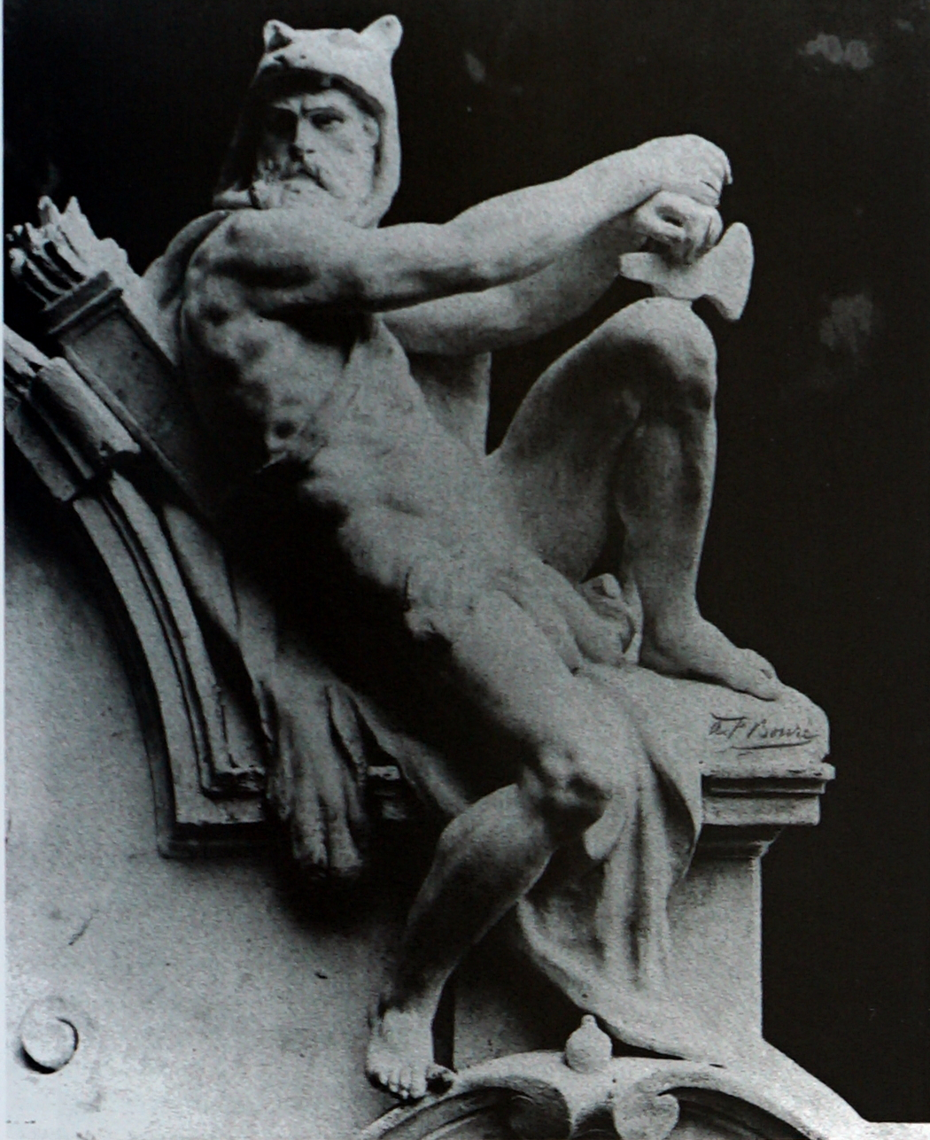 ancienne enceinte fortifiée d'Anvers.